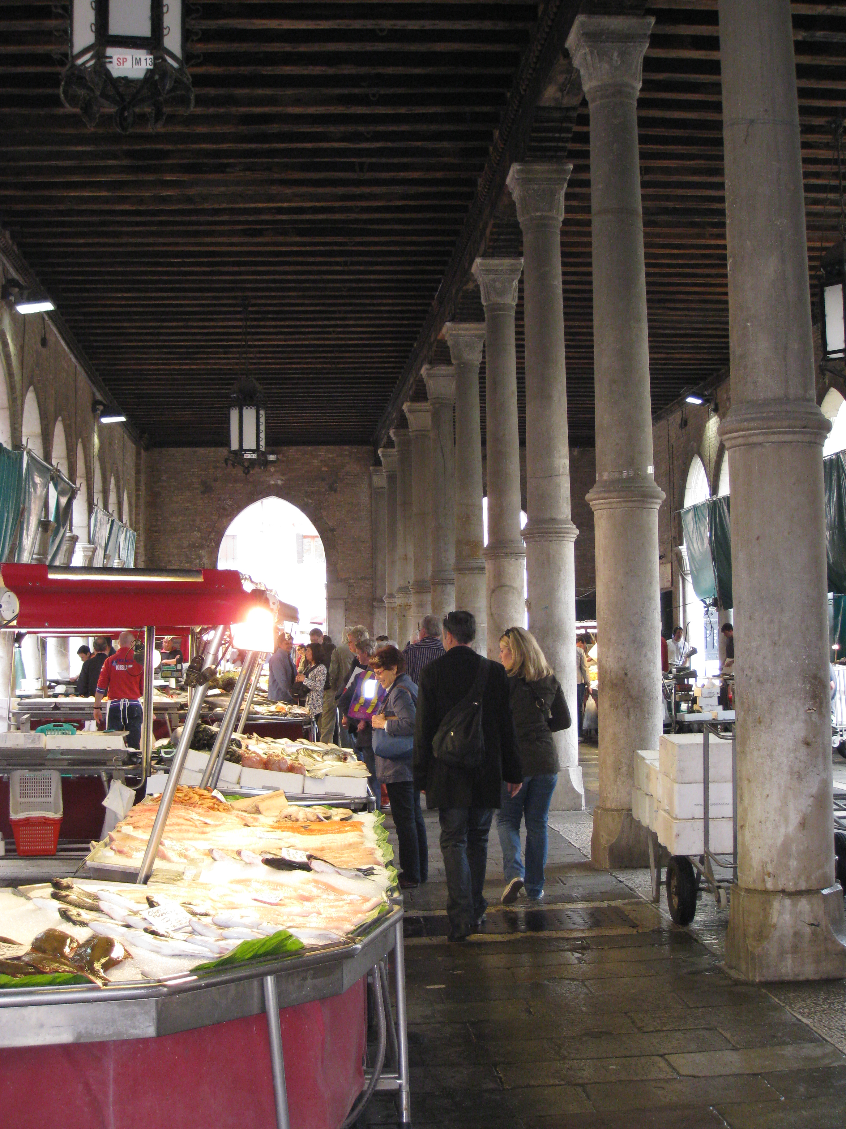 Campo della Pescaria שוק הירקות והדגים של ונציה